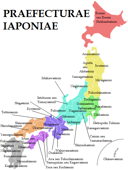 Regiones et praefecturae Iaponiae Latine